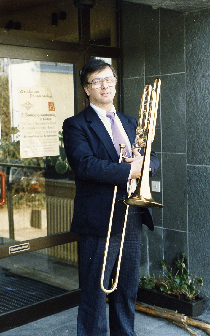 Horst Wilm am 17.April 1988 in Neukirchen - Jahreshauptversammlung des Gnadauer Posaunenbundes